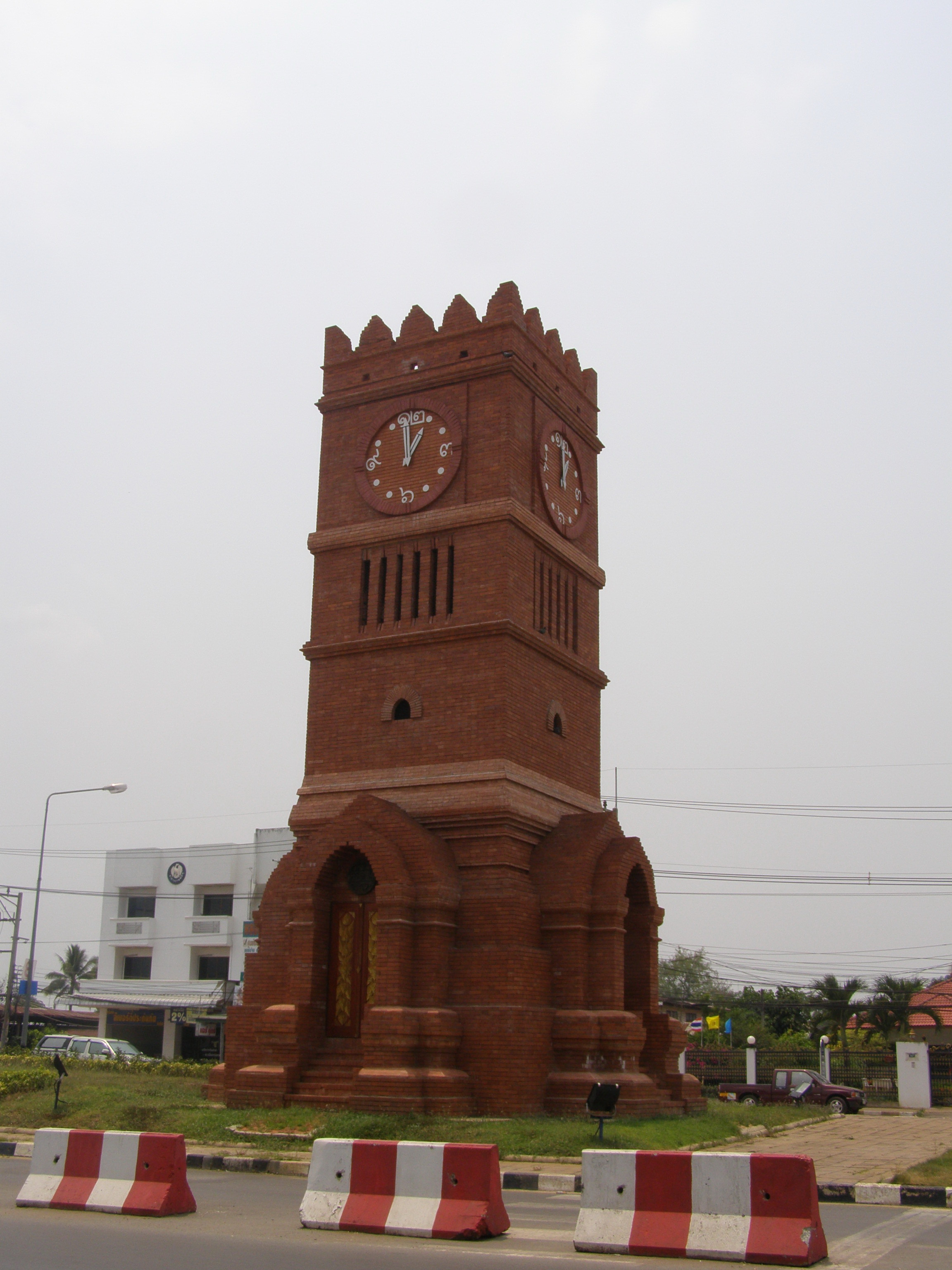 View Kamphaeng Phet By HS3CMI